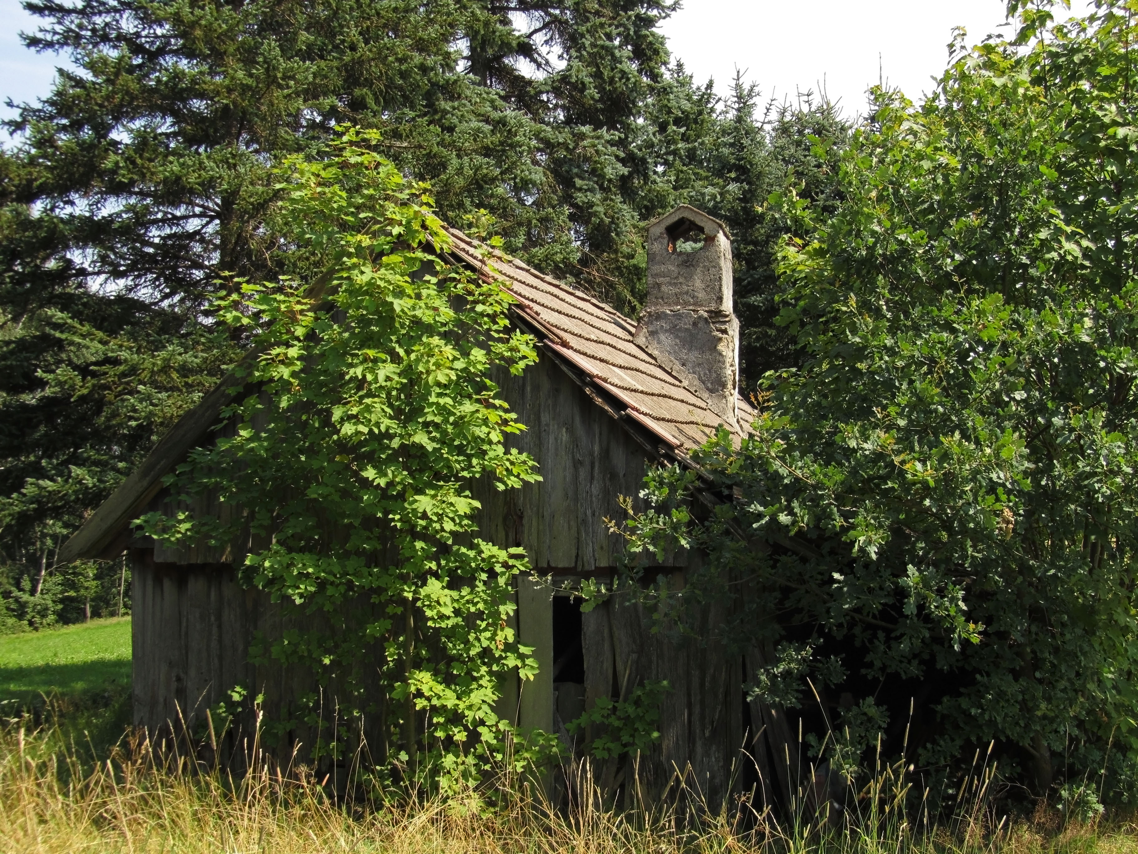 Die Haarstube ist mit der Jahreszahl 1865 bezeichnet.